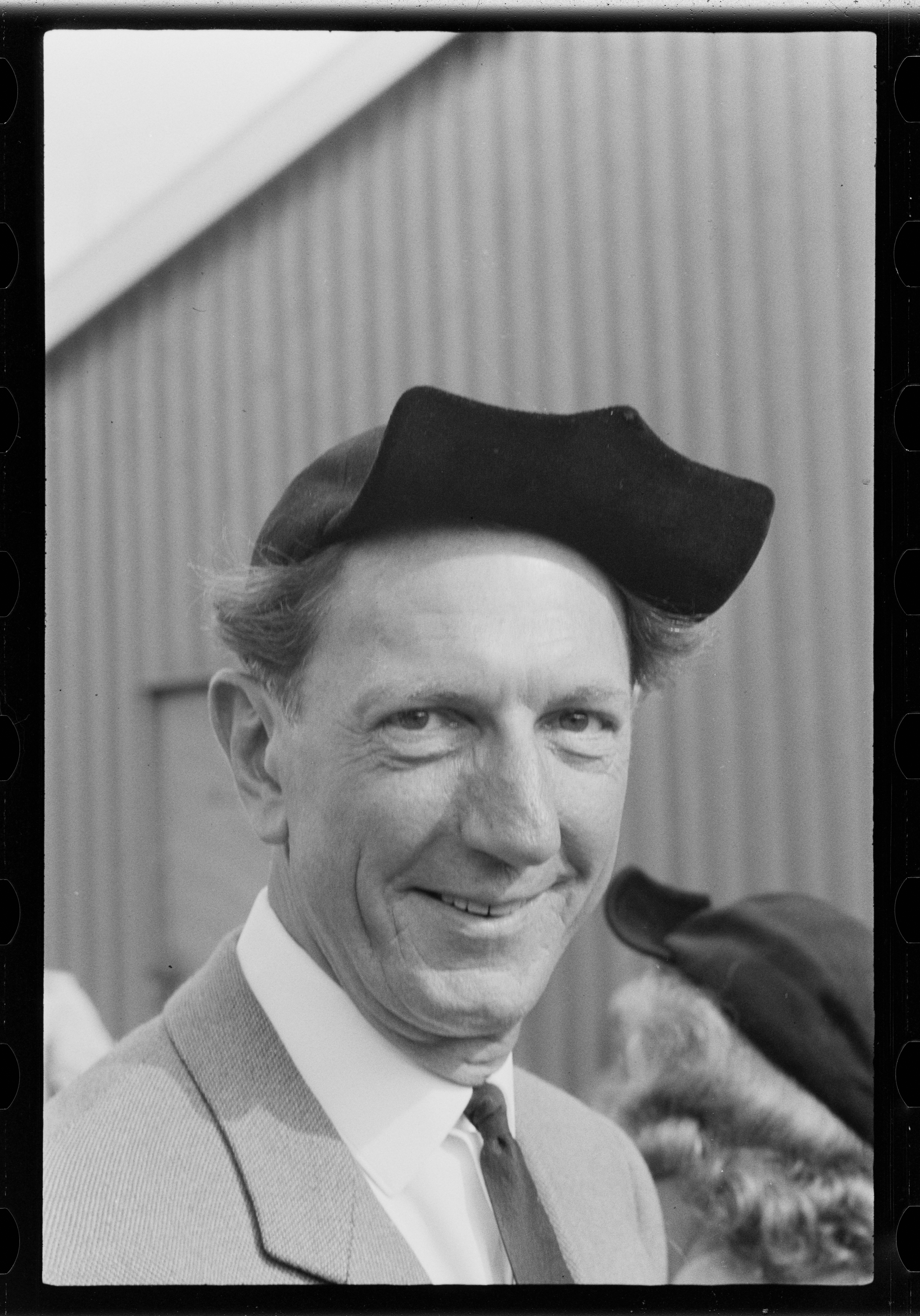 Bildet er hentet fra Arkivverket. Foto tatt i forbindelse med reportasje om den norske filmen Freske fraspark fra 1963. Manus var ved Kjell Aukrust og Bjørn Breigutu. Regi ved Bjørn Breigutu. Kjell Aukrust, Leif Juster, Turid Caldwell, Alfhild Hovdan, Per Bistrup, Lalla Carlsen Arkivinstitusjon : Riksarkivet Arkivnavn : Billedbladet NÅ Sted : Norge, Hedmark, Alvdal, Emneord: Film, Filminnspilling Avbildet: Juster, Leif